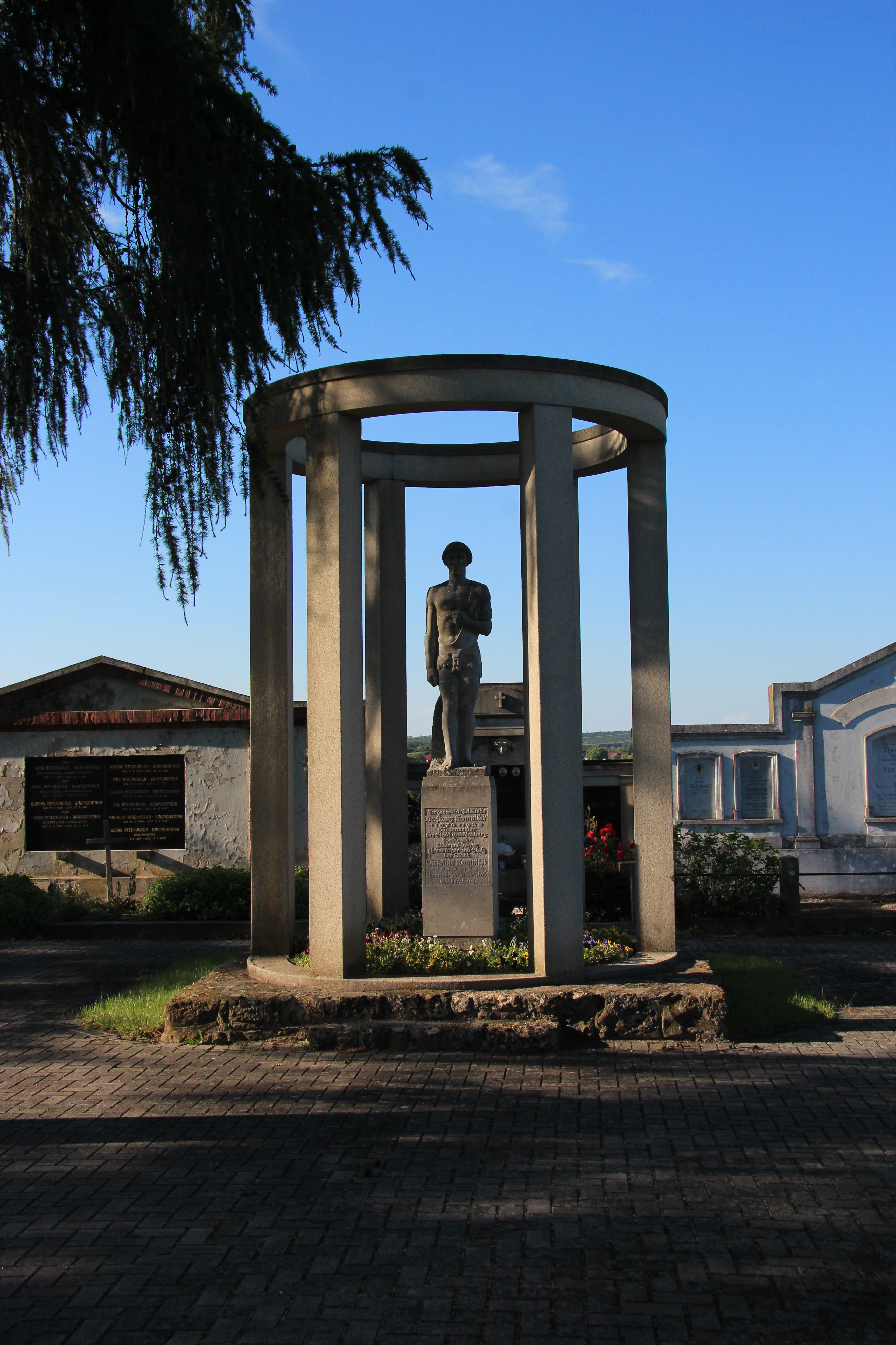 Grabdenkmal/Epitaph, Kamniker-Grabmal am Friedhof in Goritz bei Radkersburg